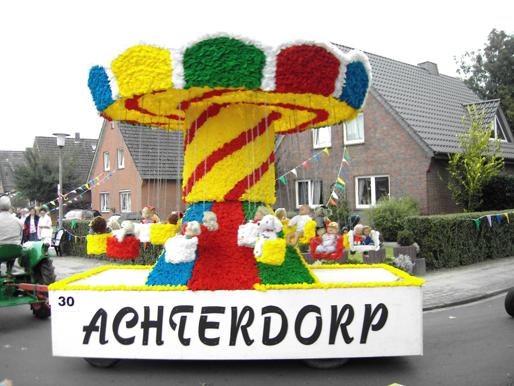 Marktwagen BV Achterdorp